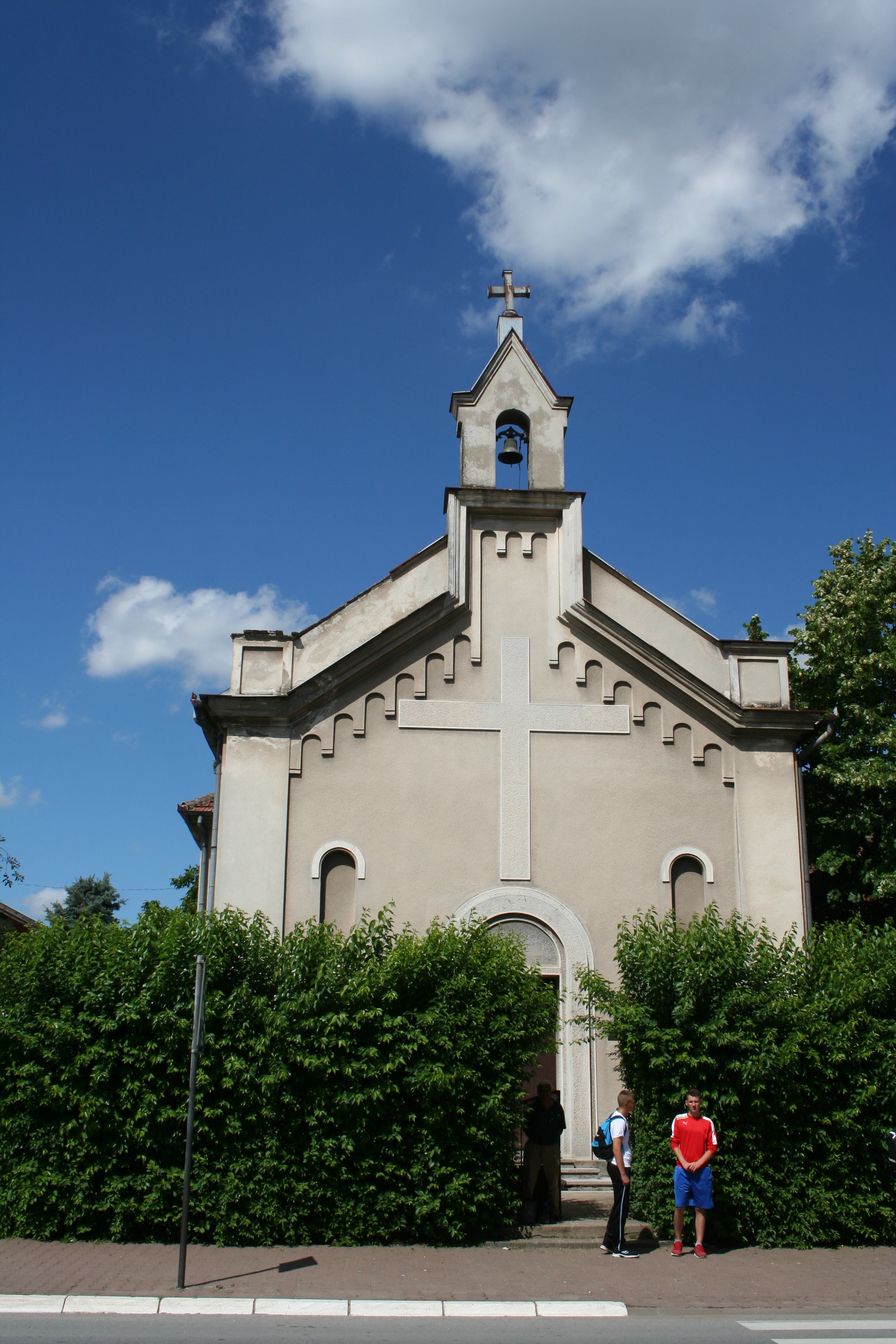 Katolička crkva